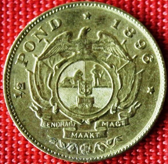 1896 Halbpfund Südarfrika Krüge